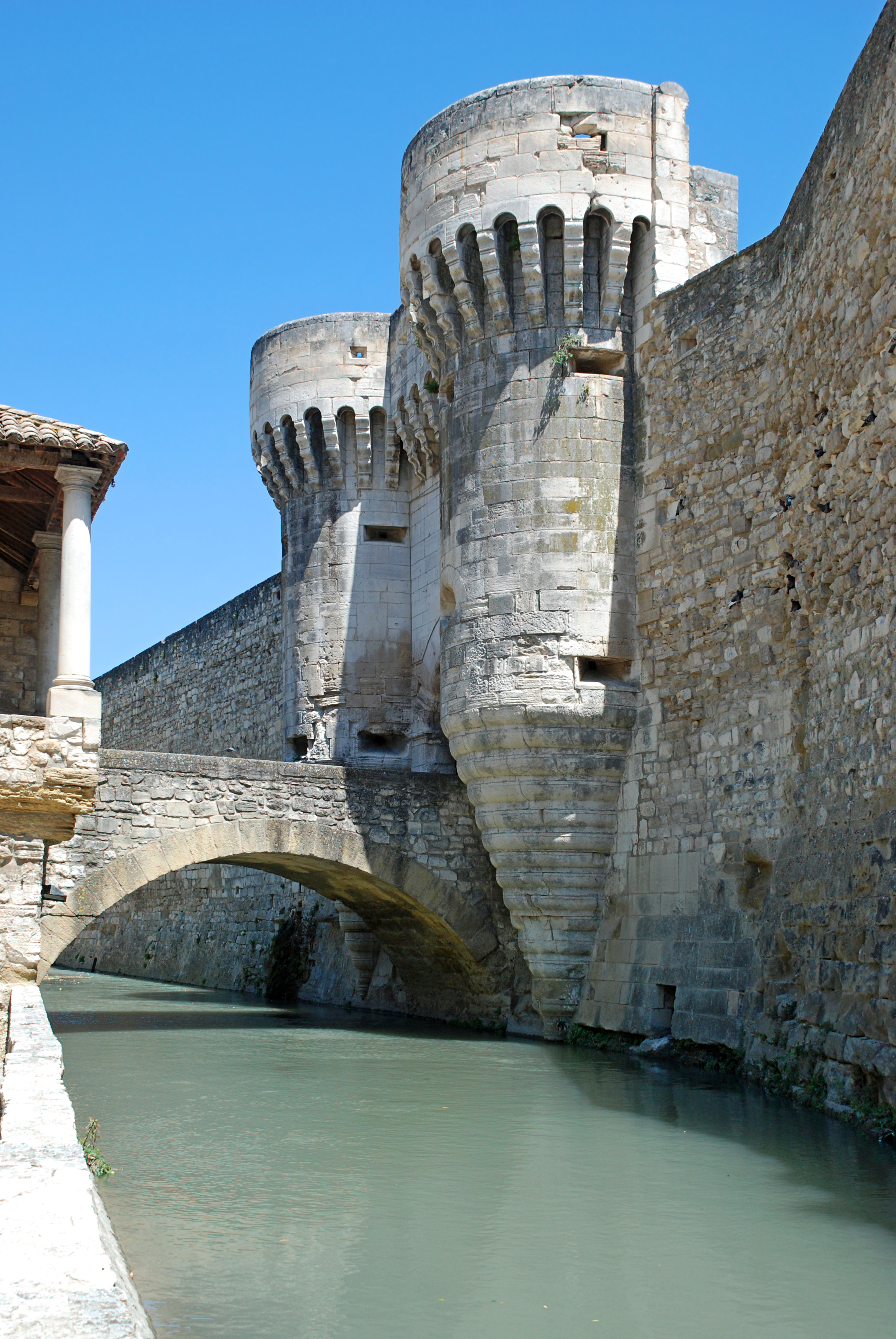 France - Provence - Vaucluse - Pernes-les-Fontaines - Chapelle et porte Notre-Dame